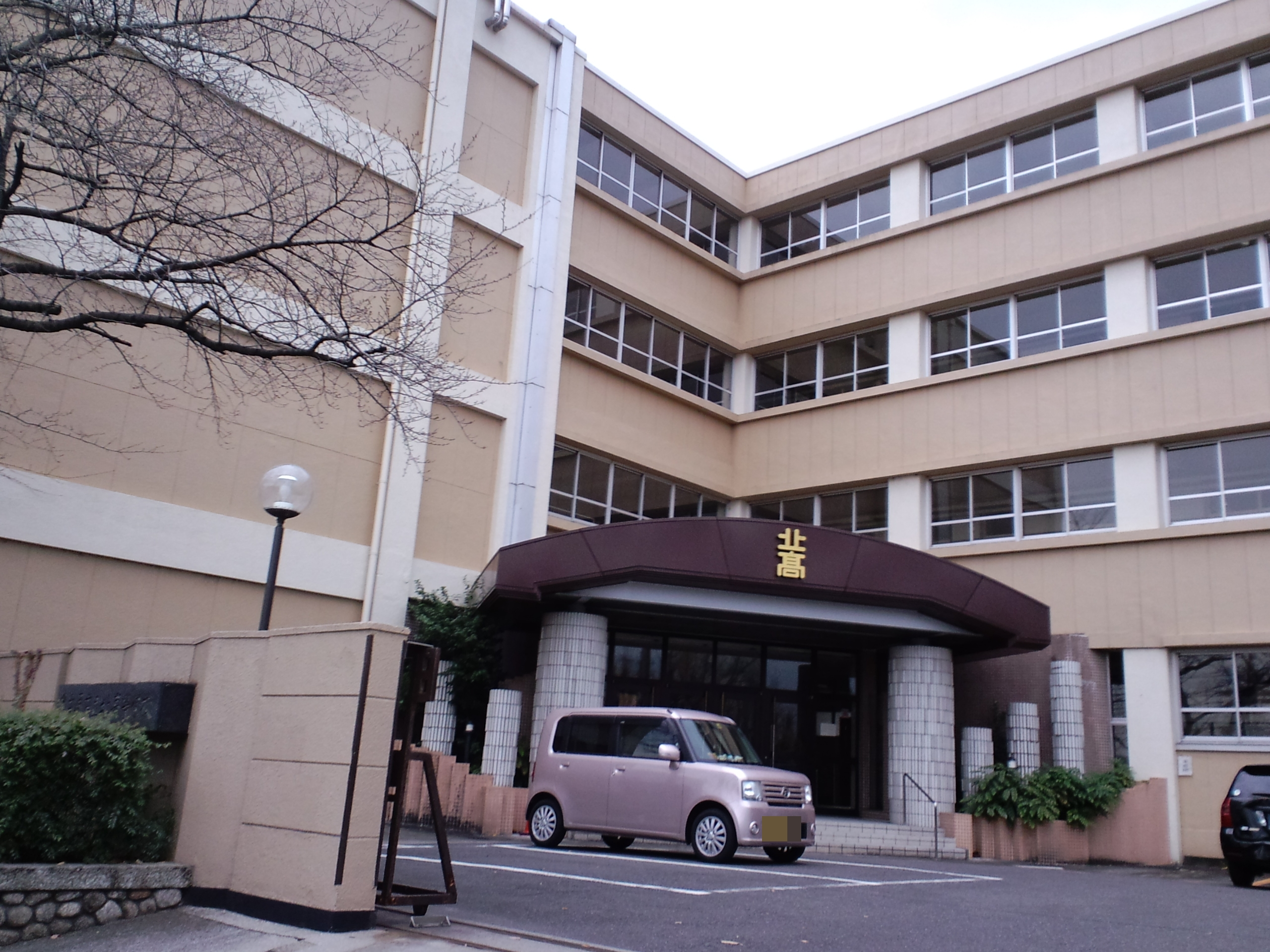 名古屋市立北高等学校